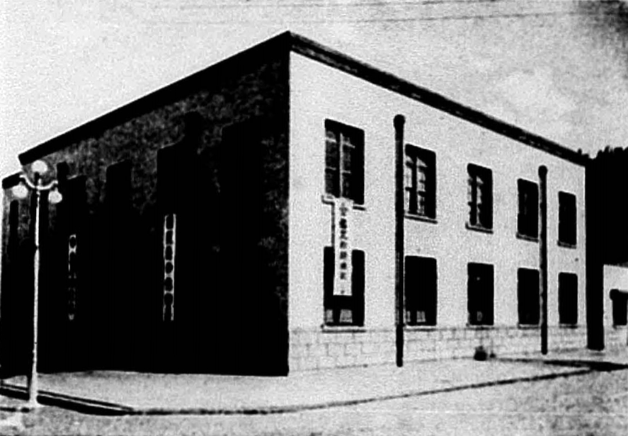 中文（台灣）: 台灣銀行新竹支店，新竹市歷史建築